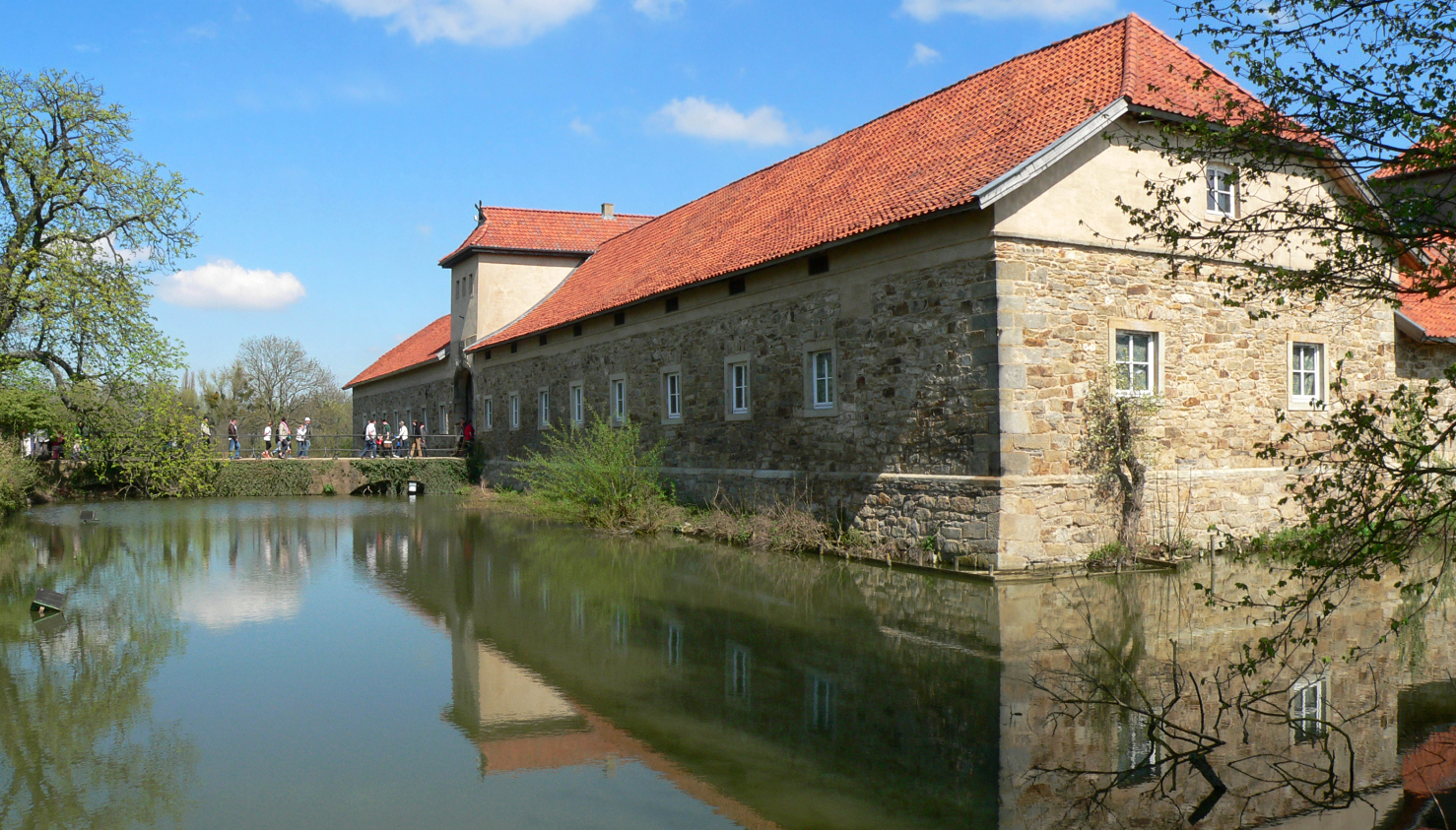 Wassergraben mit steinerner Brücke zum Eingang zum Rittergut Remeringhausen